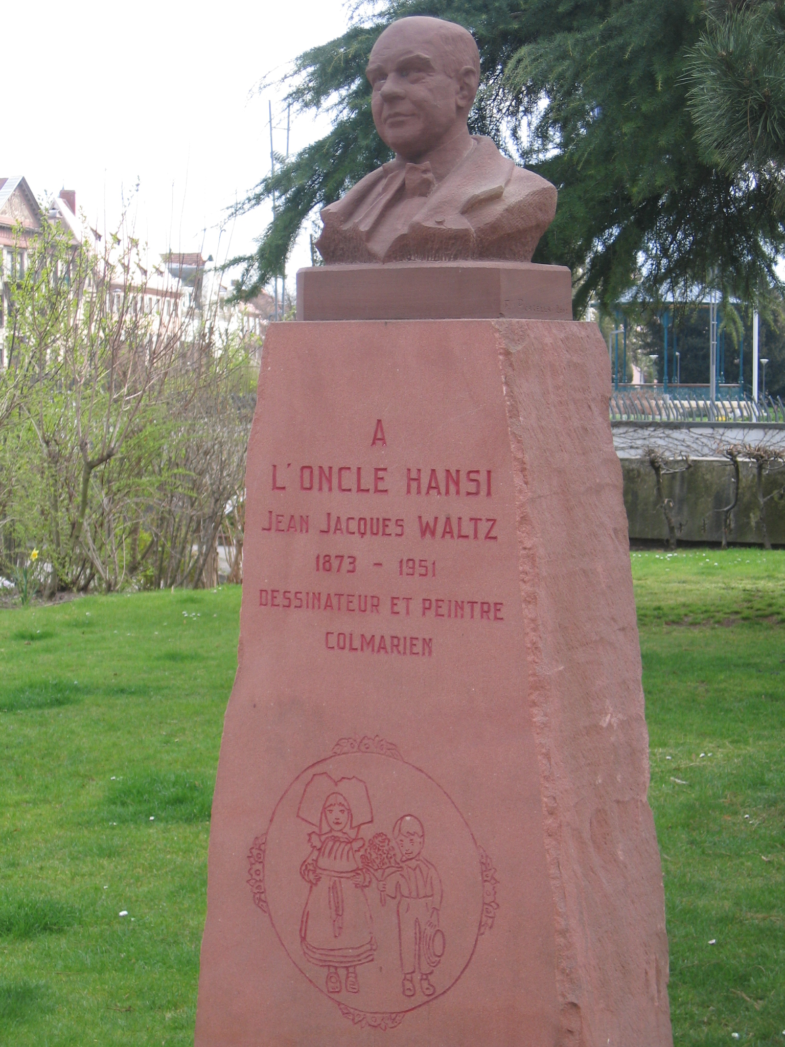 La statue de l'oncle Hansi boulevard du Champ de Mars